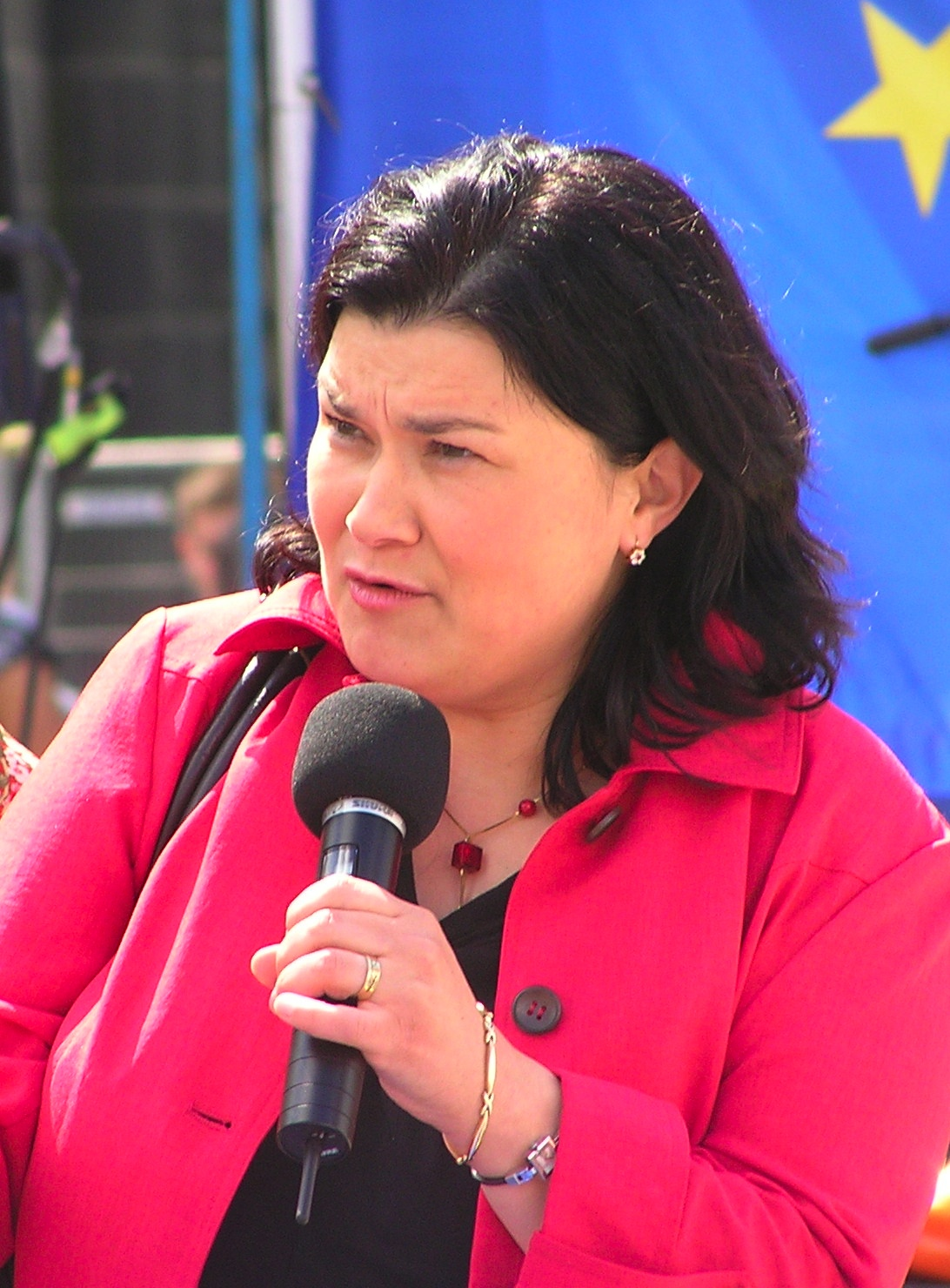 Emine Bozkurt. Amsterdam, mei 20099